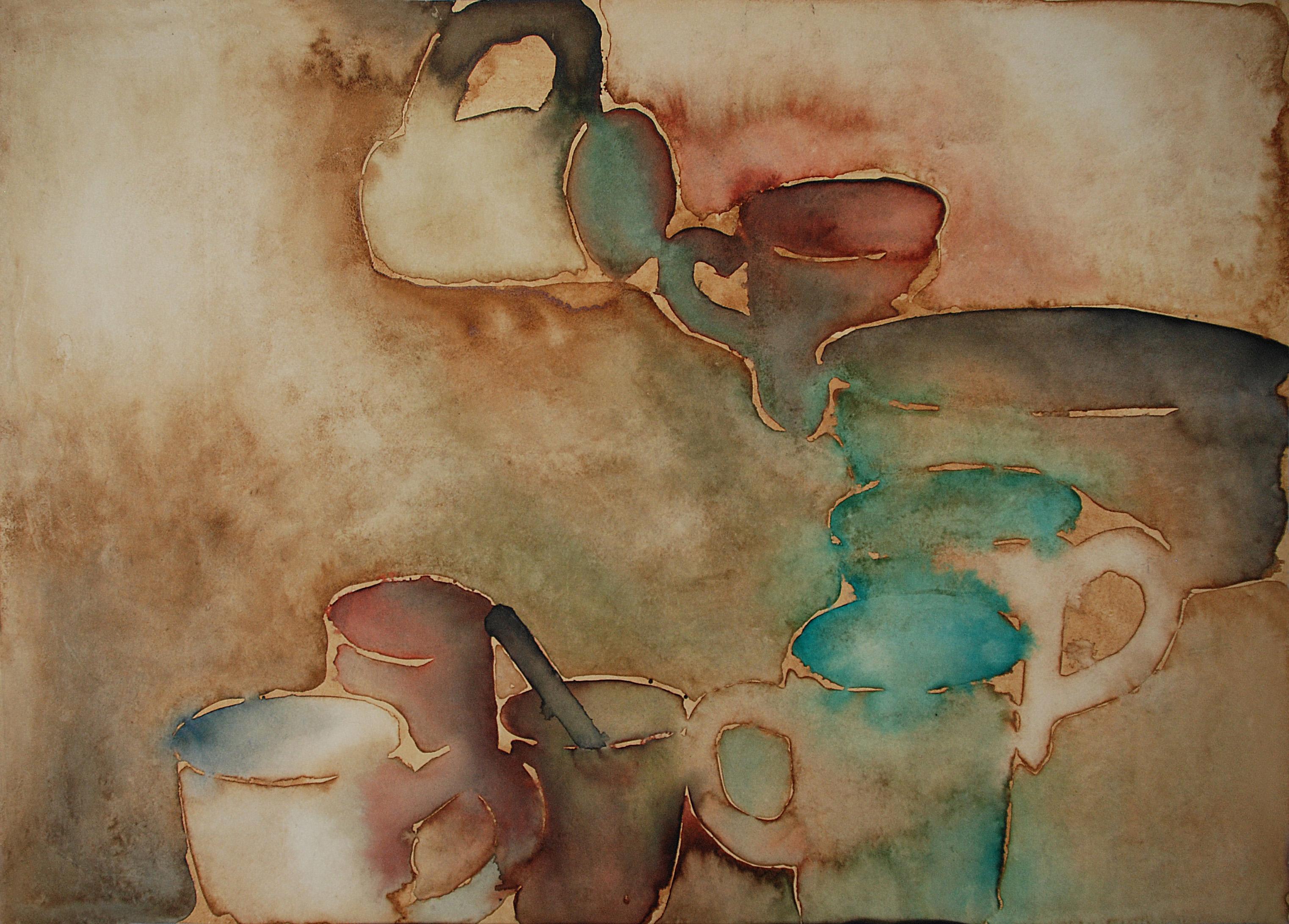 Креативни хаос 1, Акварел, 2017. 70 х 50 цм, уметничко дело аутора Данице Веселиновић Лиценцирање Template:Za ostavu